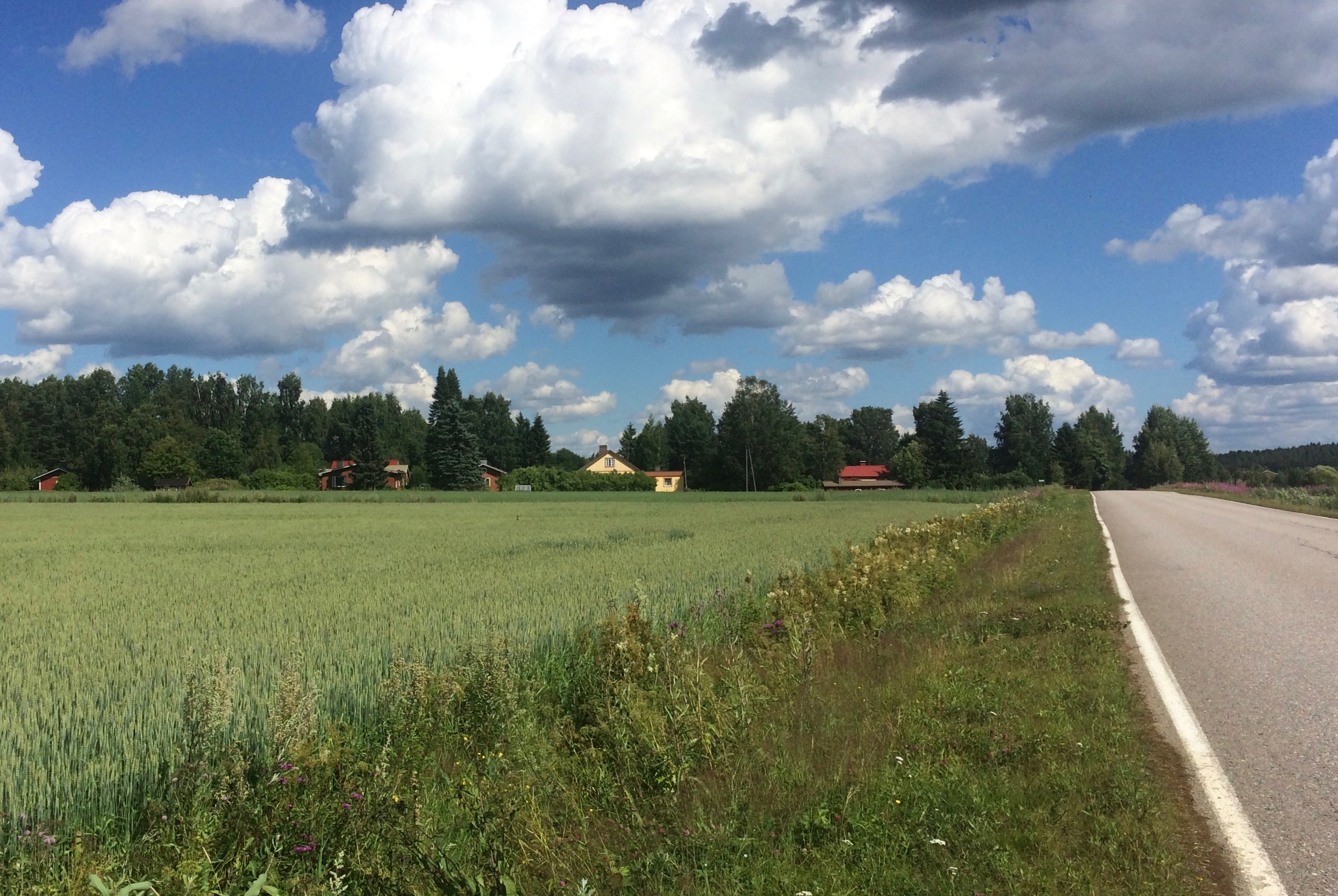 Hämeenlinnan Tuuloksen Juttilan kylää Laurinkallion lähellä.